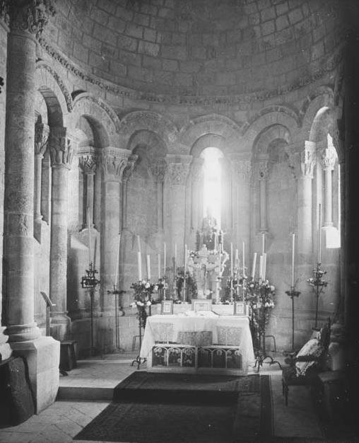 Imatge